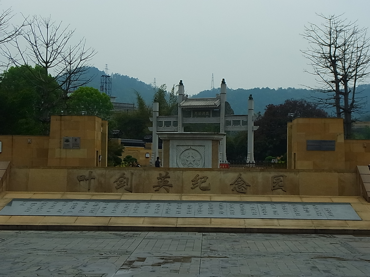 叶剑英纪念园